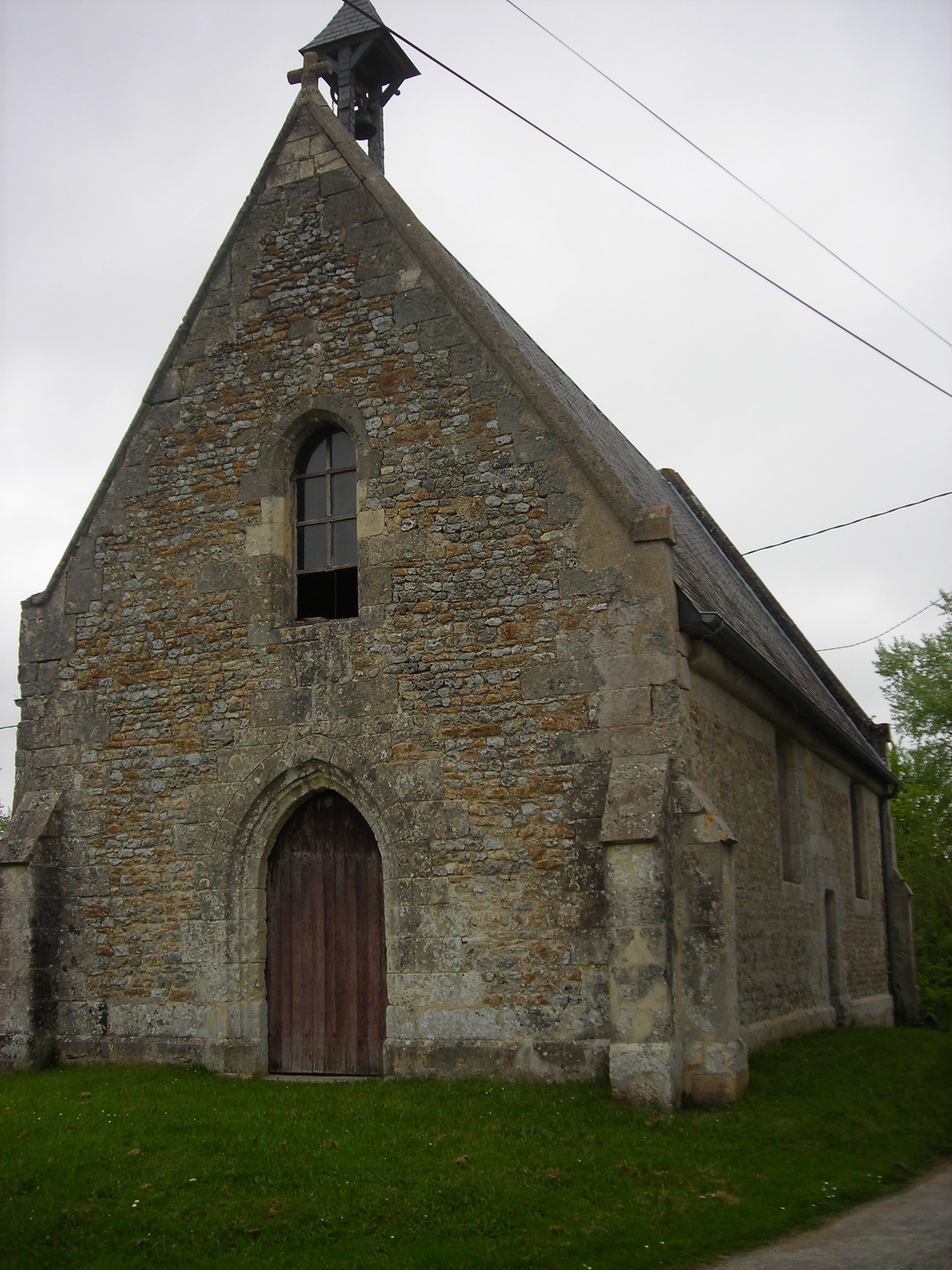 chappelle saint Jean d'Auvillars (france)